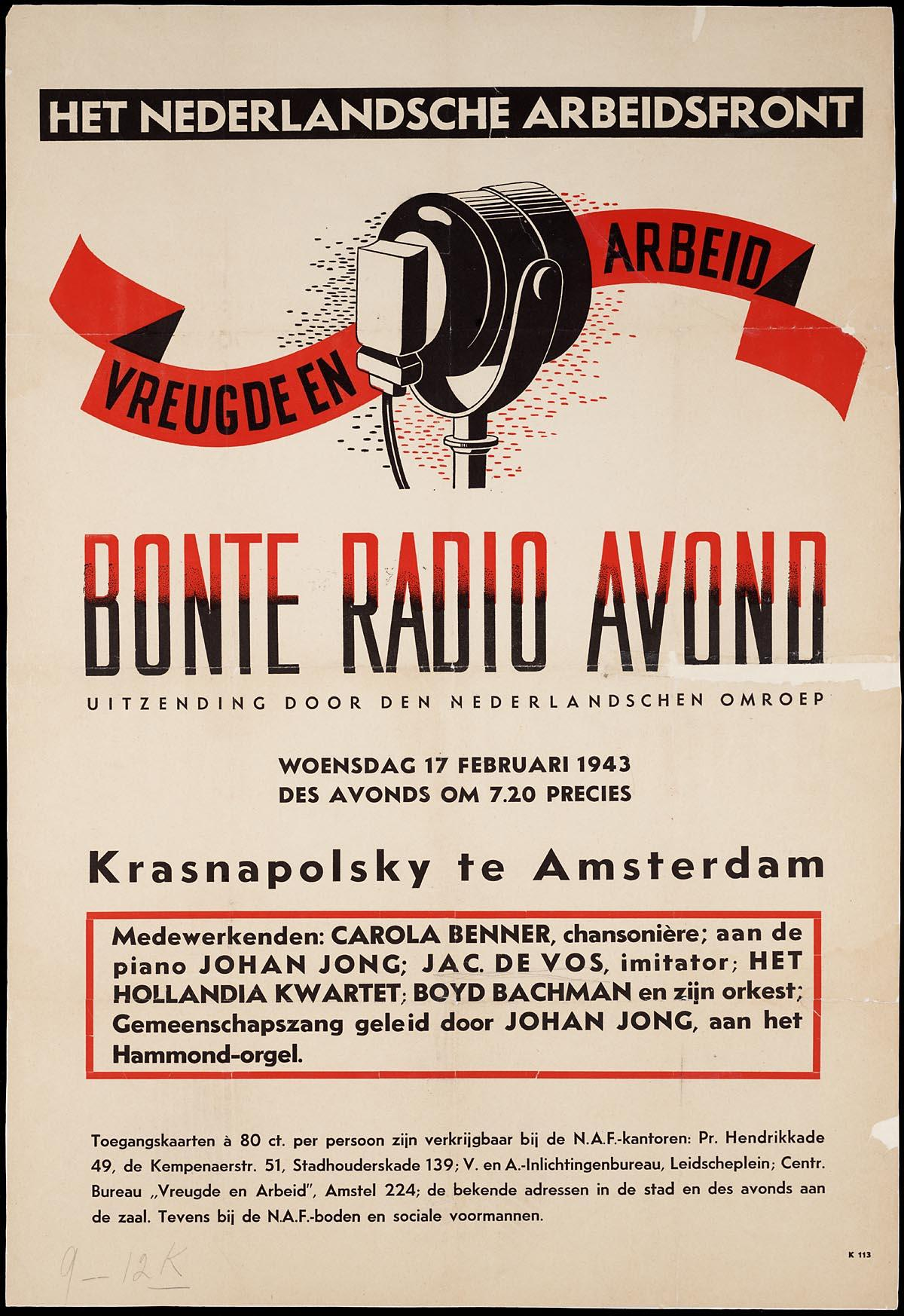 Affiche: "Het Nederlandsche Arbeidsfront. Vreugde en Arbeid. Bonte Radioavond. Uitzending door den Nederlandschen Omroep. Woensdag 17 februari 1943 Krasnapolski te Amsterdam. Medewerkenden: Carola Denner chansonnière aan de piano Johan Jong (e.a.)."